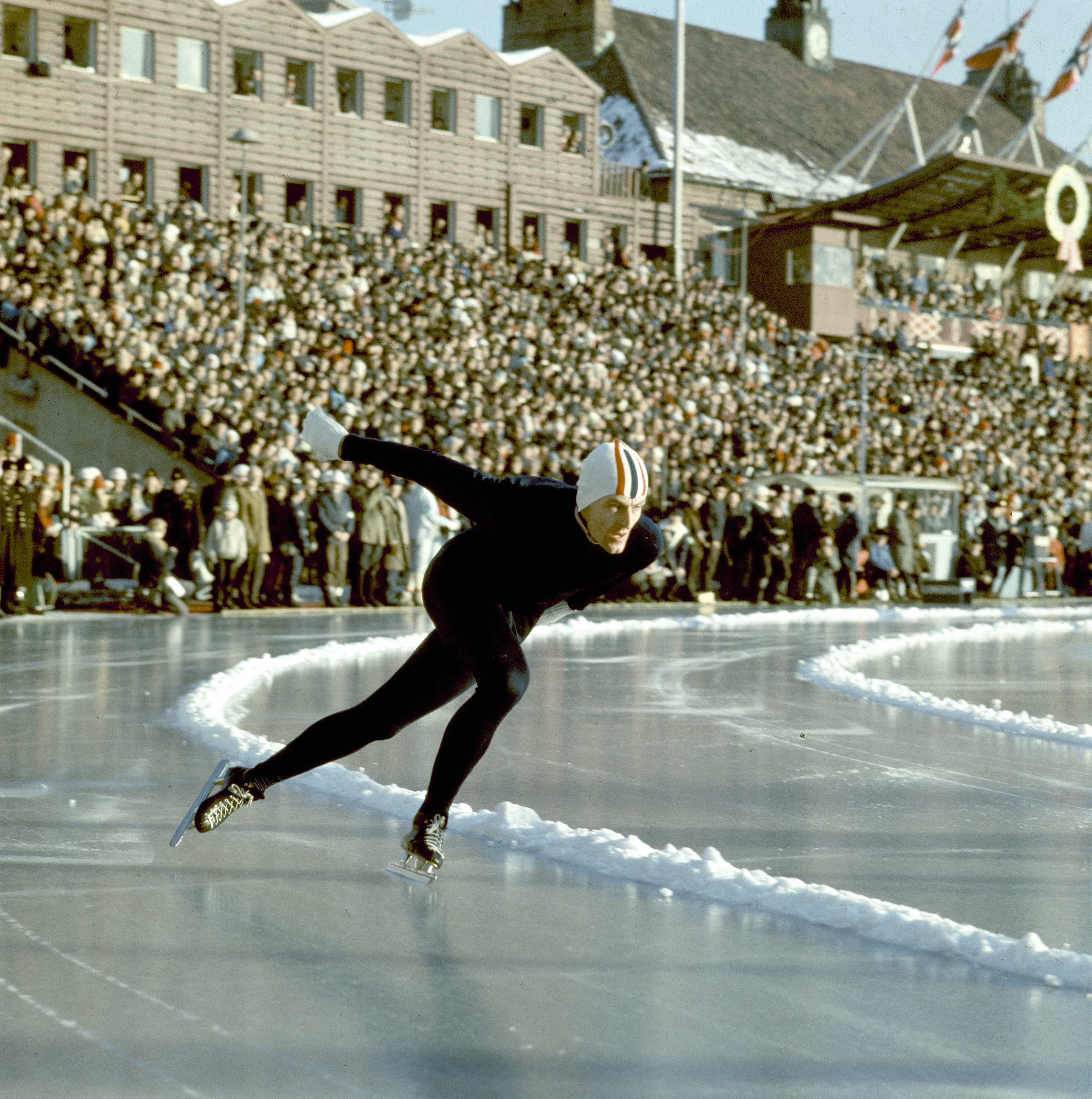 Fred Anton Maier Europamester på Bislett.